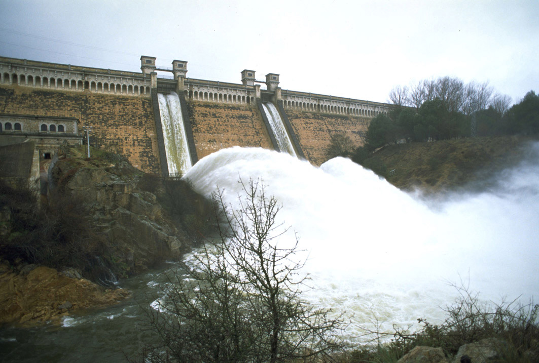 La presa tiene 56 metros de altura y más de un kilómetro de longitud, siendo una de las más largas de toda España.